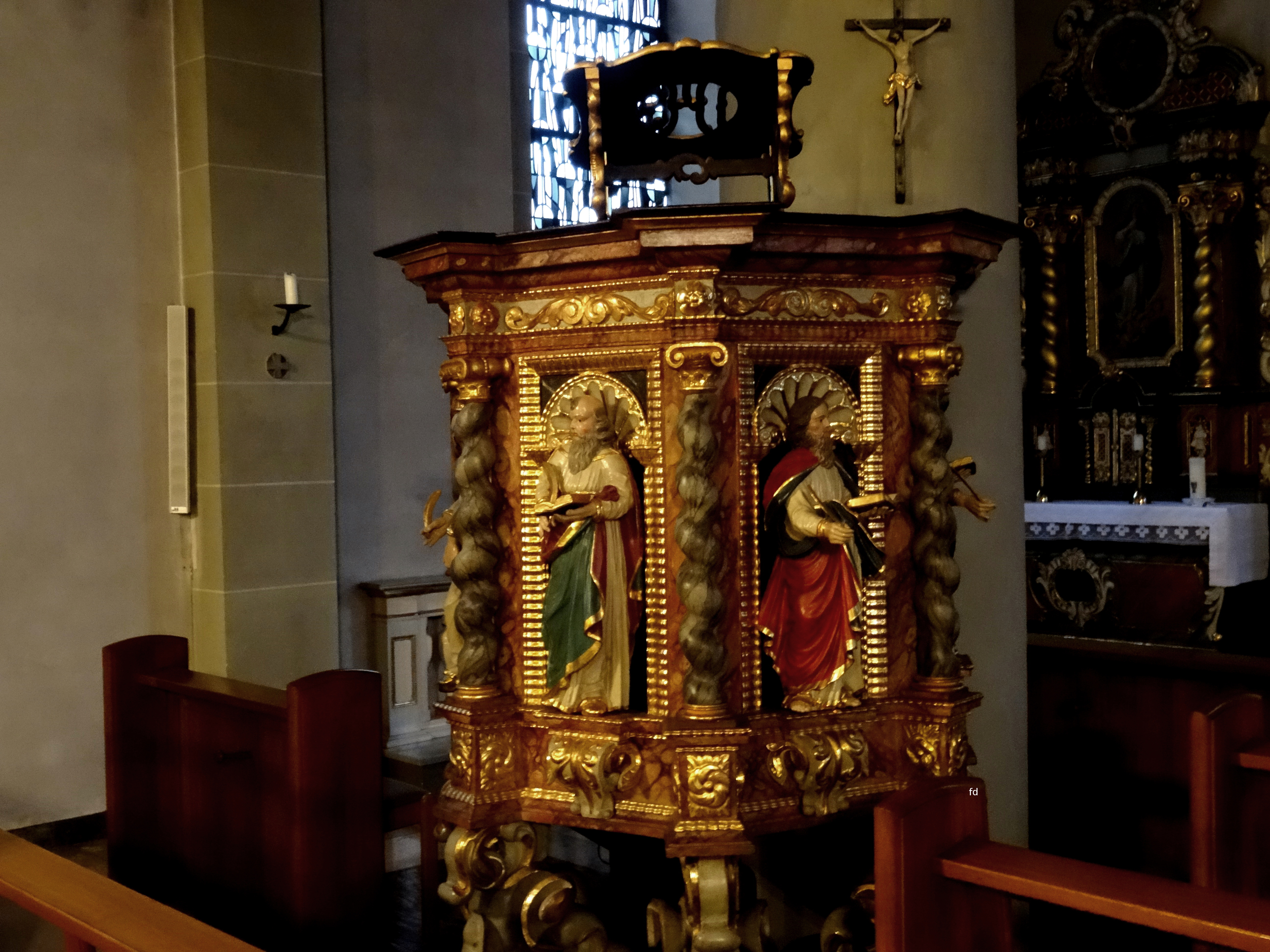 St. Christophorus Hirschberg Kanzel.